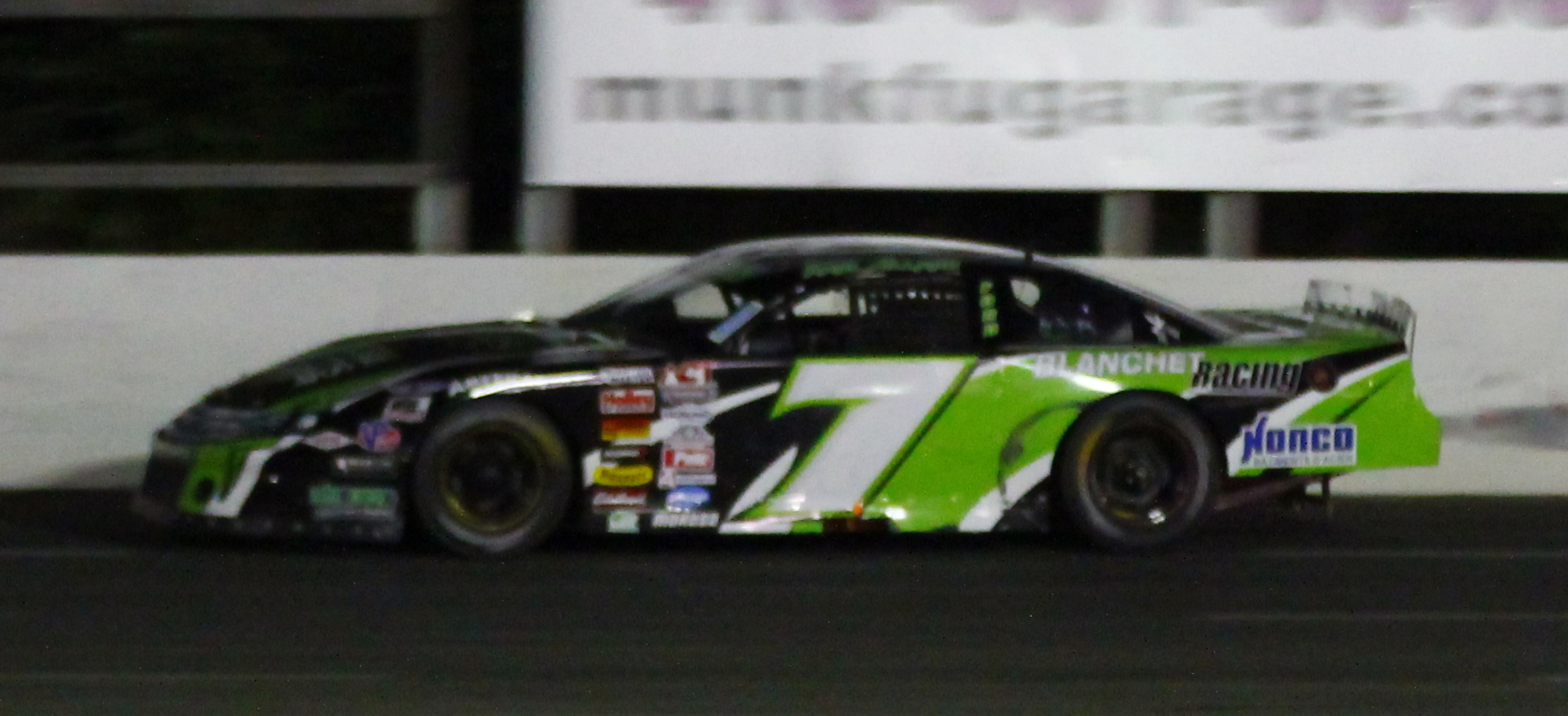 Karl Allard - Série ACT - Autodrome Montmagny - 27 juin 2015 (photo Paul-Émle Poulin-Jacques)